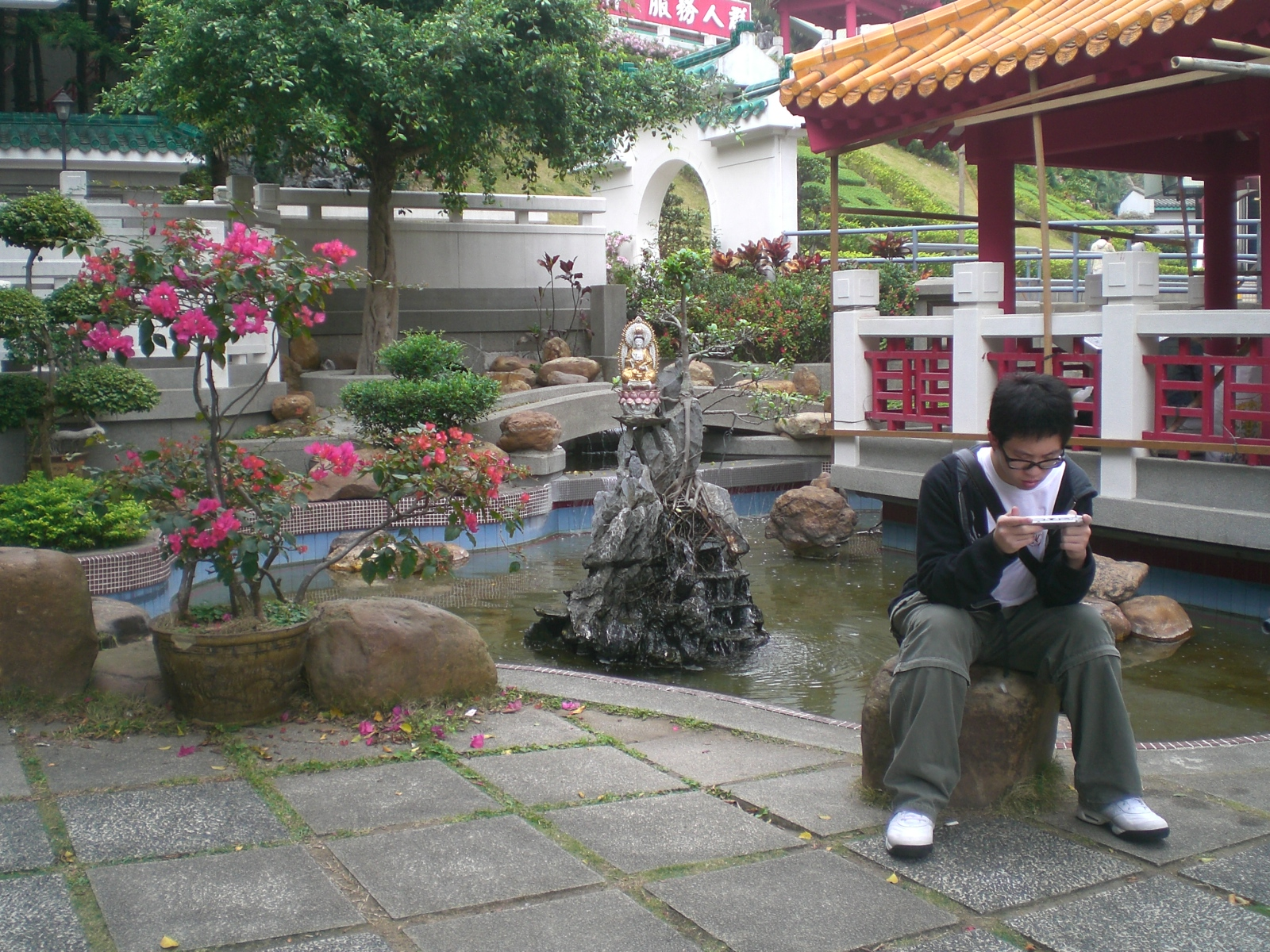 沙田寶福山園內環境